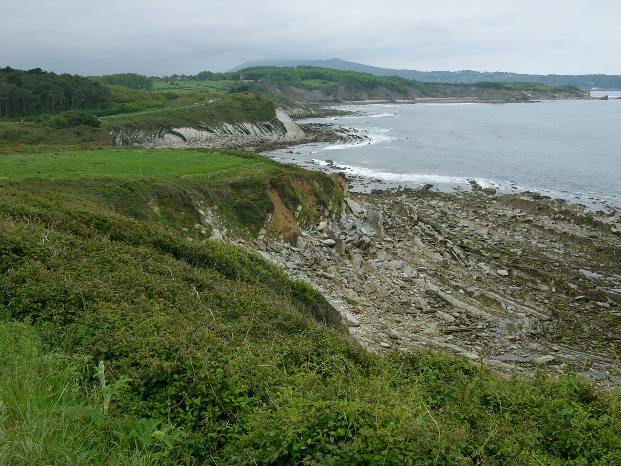 Corniche basque de Ciboure à Hendaye Urrugne Pyrénées-Atlantiques France